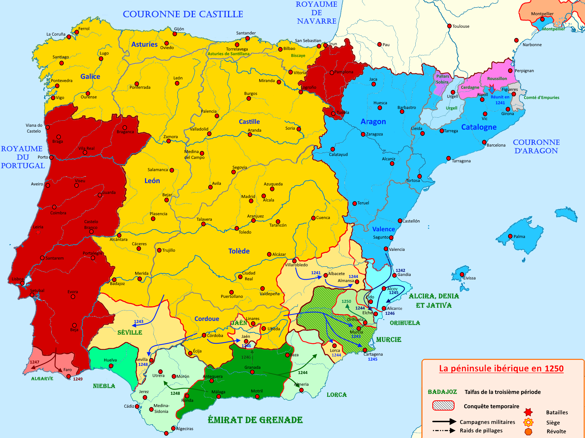 Carte de la péninsule ibérique en 1250 montrant les principaux faits historiques de la période